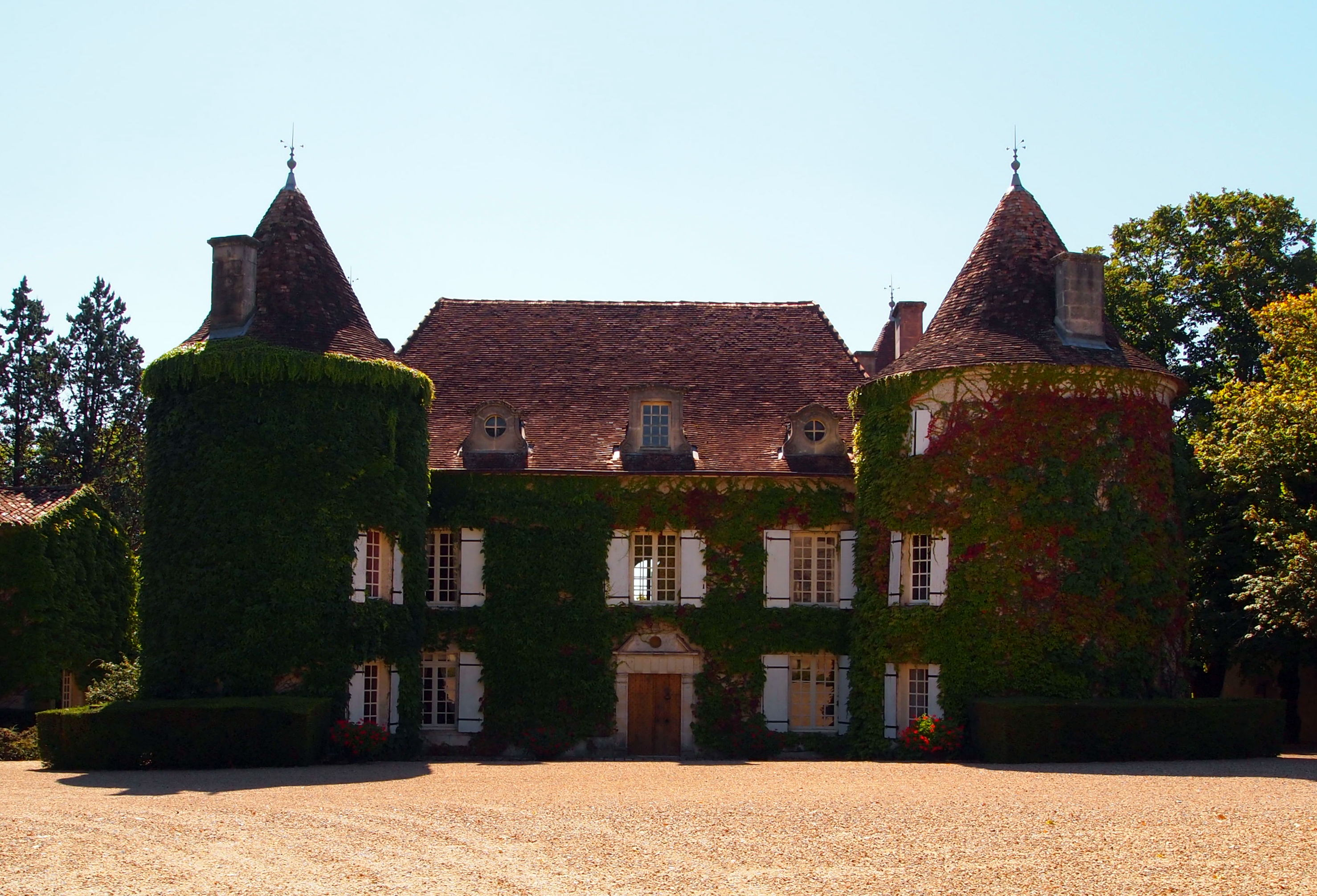 Château de Mérignac en Charente, en France